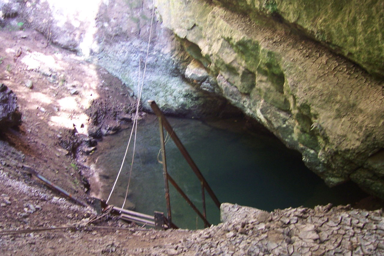 Le regard sur l'Ouysse souterrain de Pouymessens à un km en amont de Cabouy. Par temps pluvieux, ce regard absorbe le petit ruisseau qui se forme dans la vallée, mais par forte crue de l'Ouysse, il fonctionne en résurgence. Une formation géologique comme ça on s'appele "Estavelle".